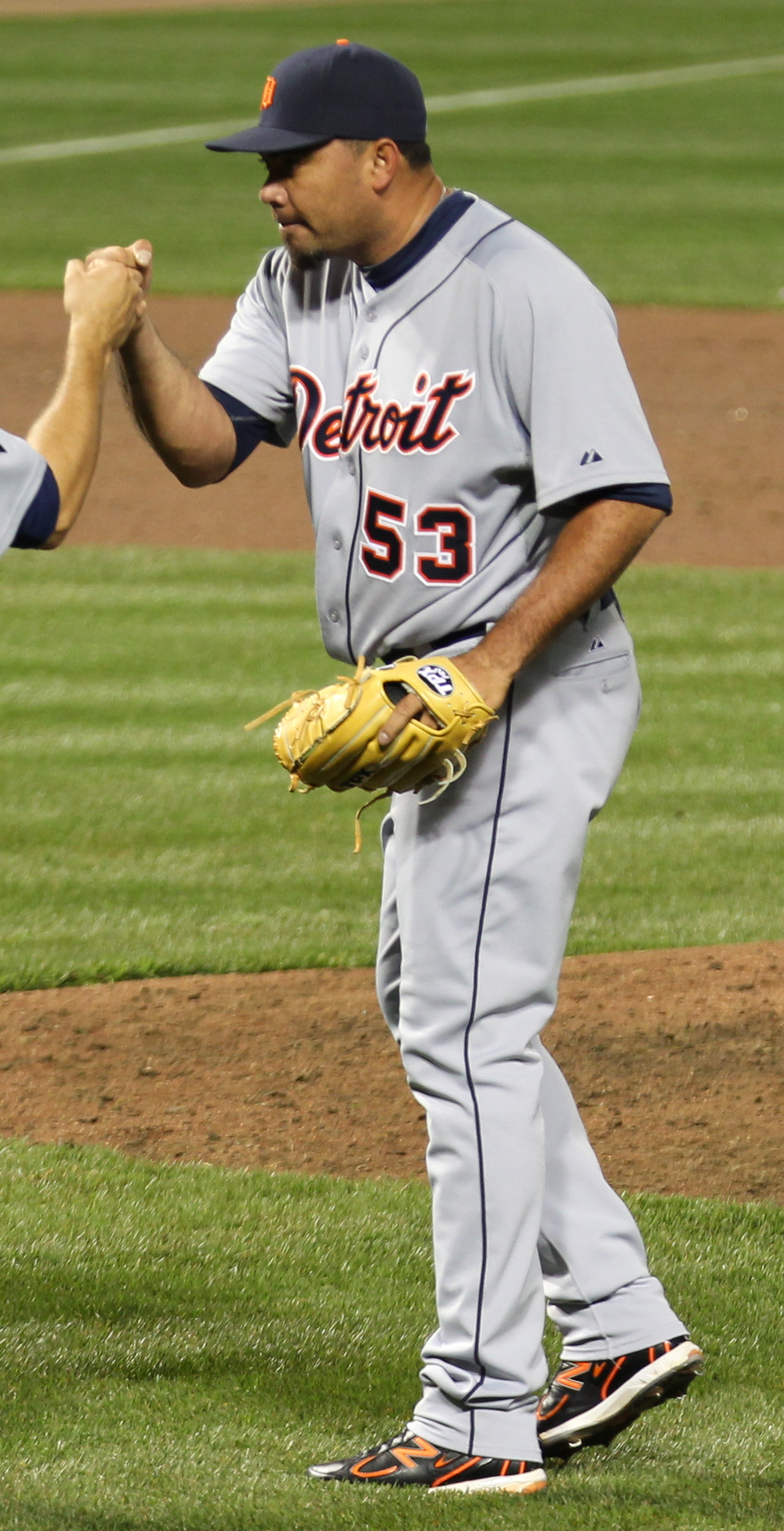 Joaquín Benoit